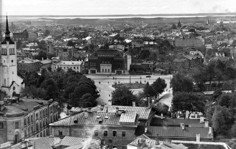 Tallinna vaade. Vaade Vabaduse väljakule, vasakul Jaani kirik, keskel praegune Vene Draamateatri hoone